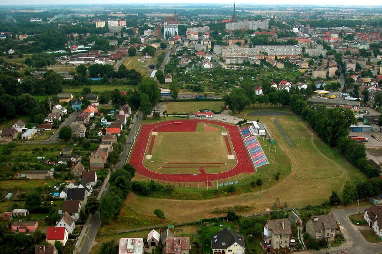 Stadion lekkoatletyczny w Stargadzie